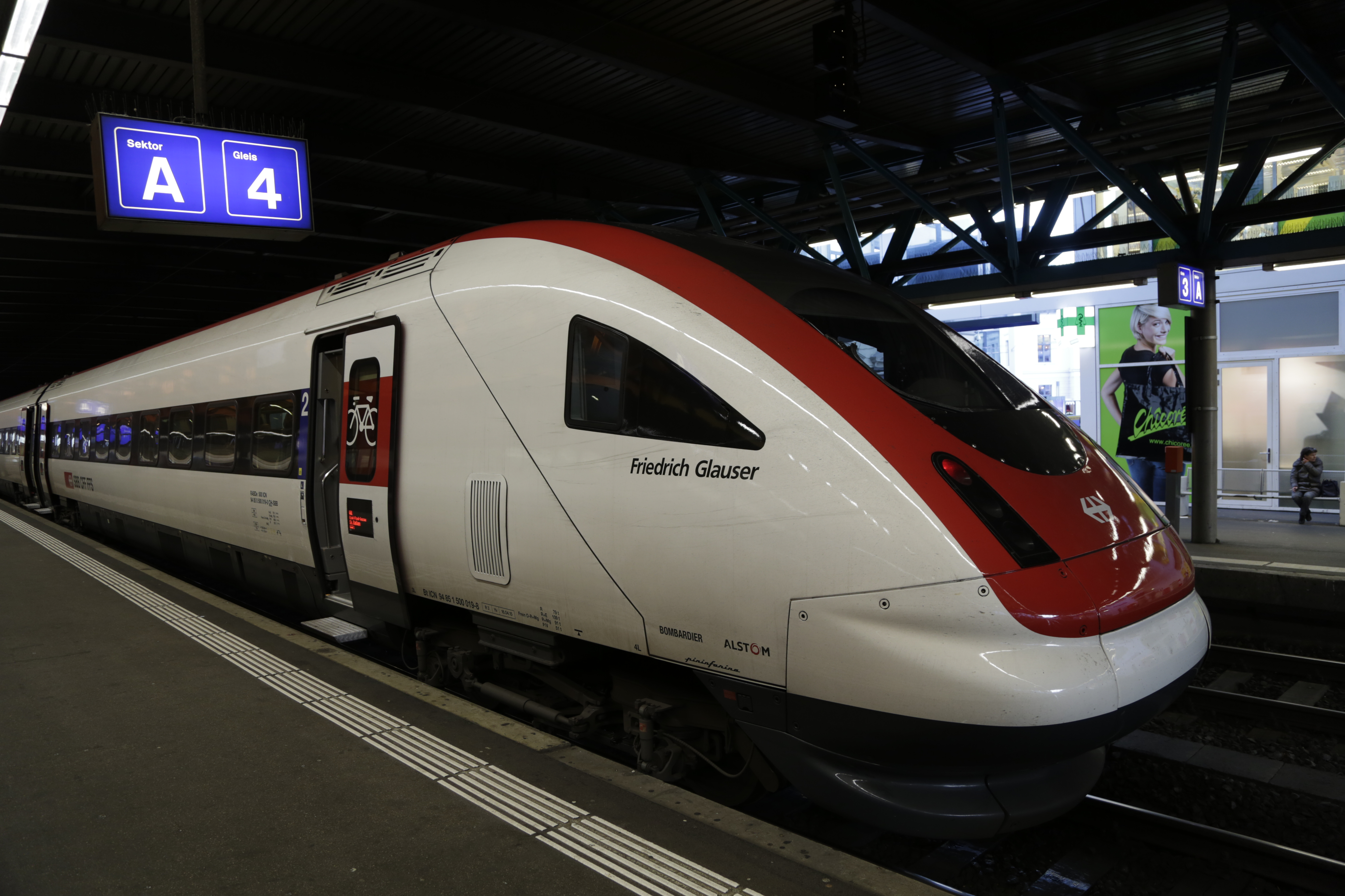 Der SBB ICN (RABDe 500) 019 im Bahnhof Winterthur